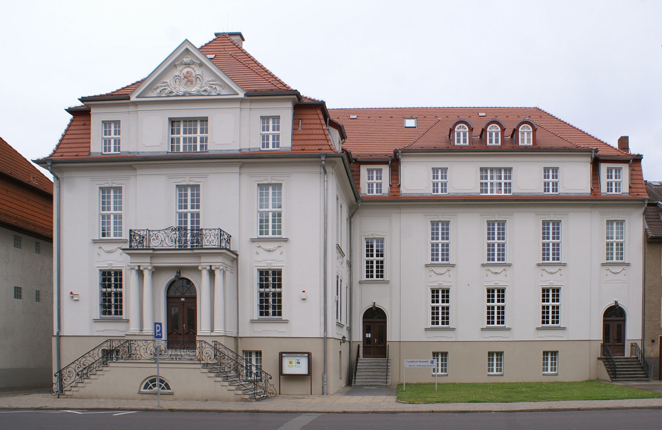 Demmin - Haus 2 der Landkreisverwaltung - Ehemalige Kreissparkasse